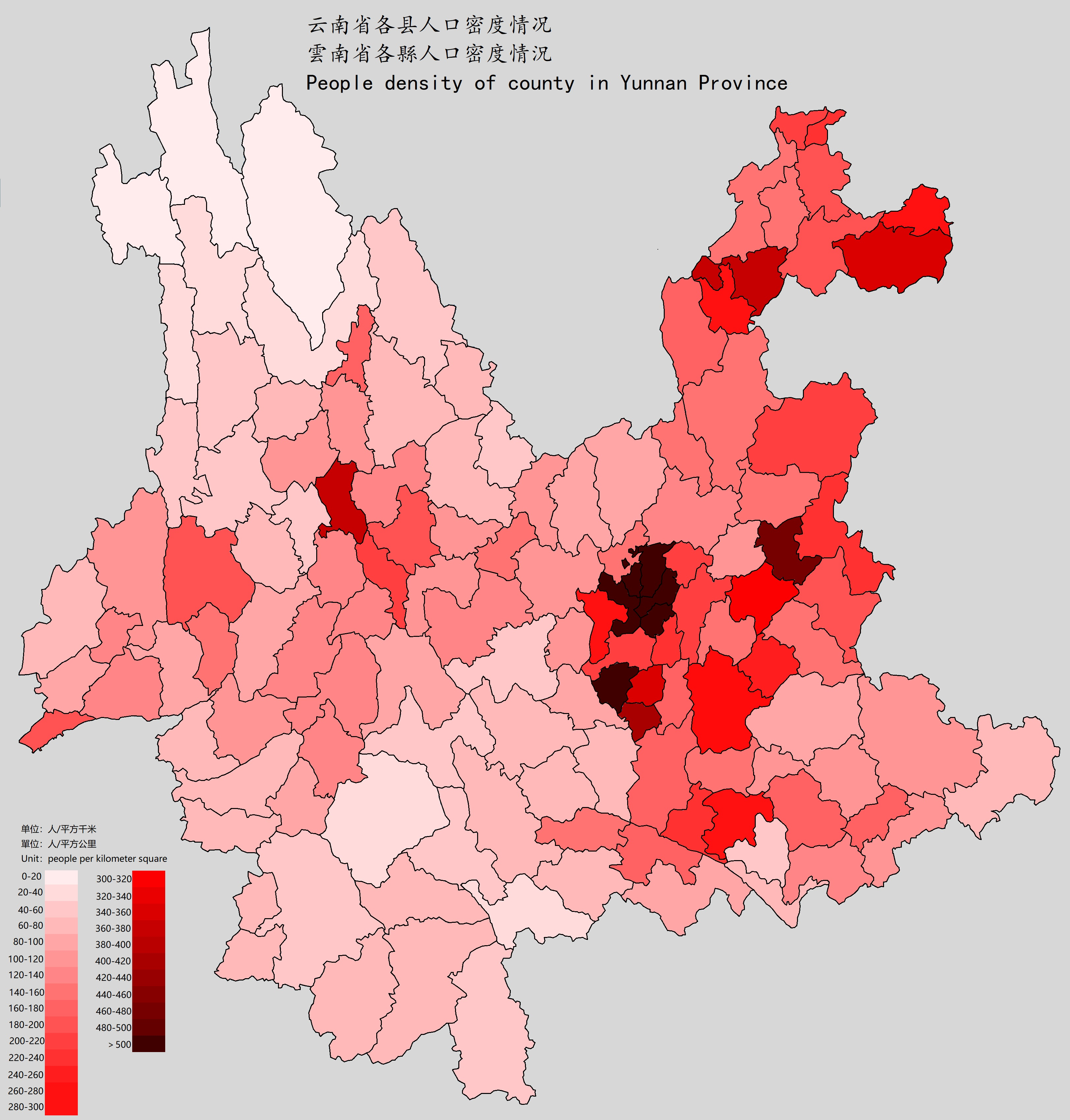 中文（中国大陆）: 云南省各县人口密度